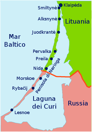 Mappa della penisola di Neringa o penisola dei Curoni/Curi